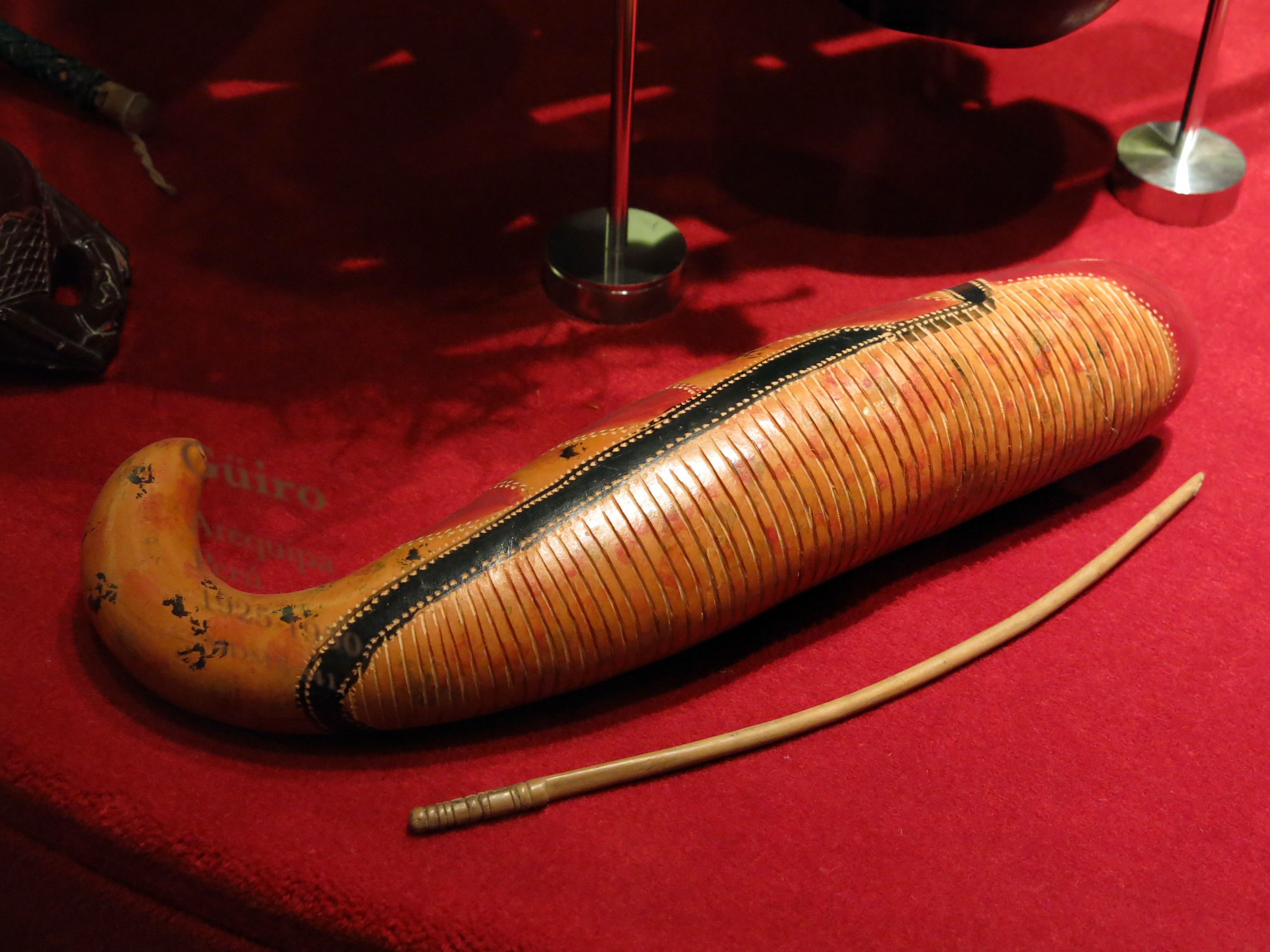 Güiro. Perú; Arequipa. Segon quart segle XX. Museu de la Música de Barcelona (MDMB 841).